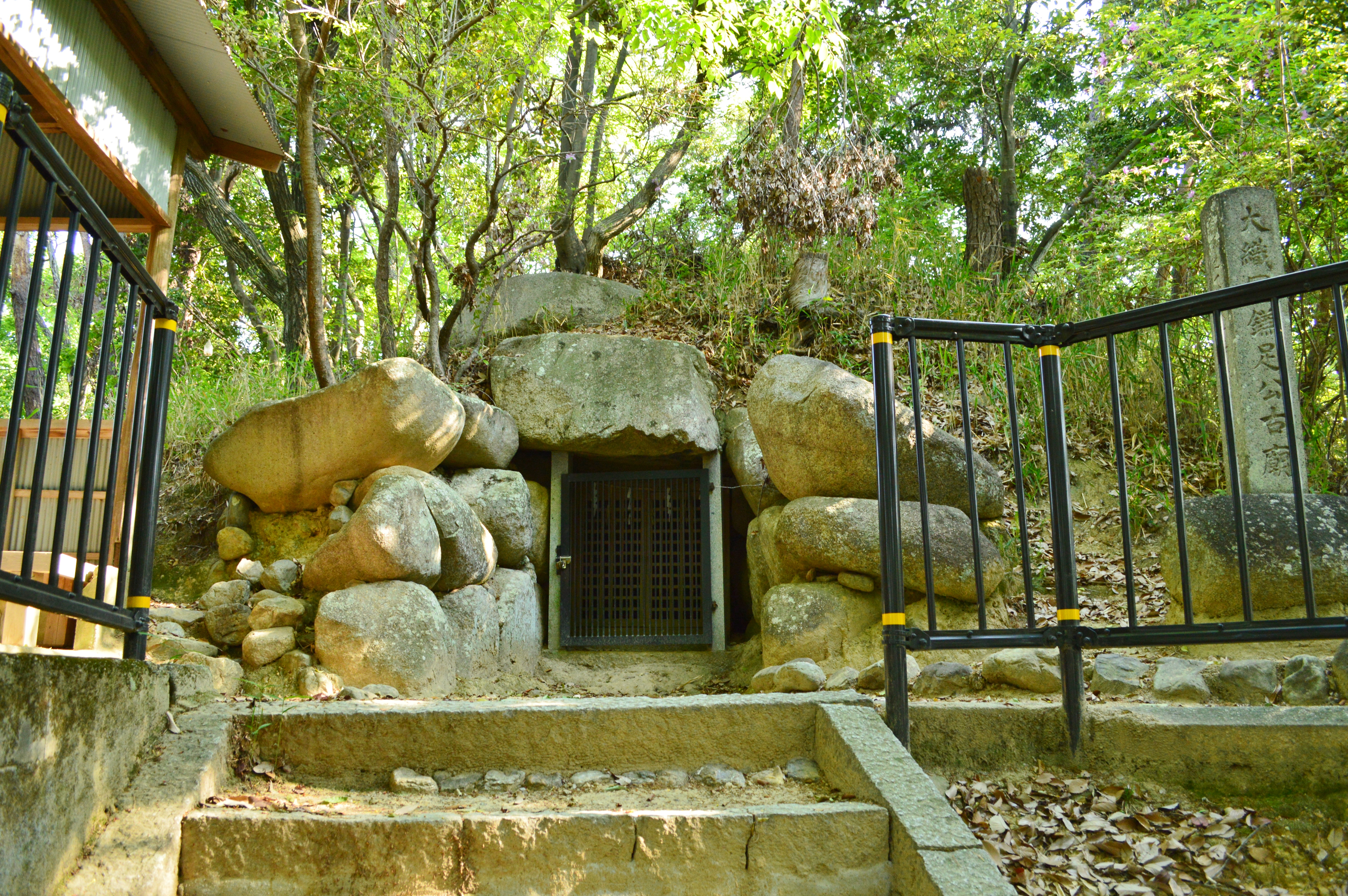 将軍塚古墳 (茨木市) 石室入り口 Nikon D3200